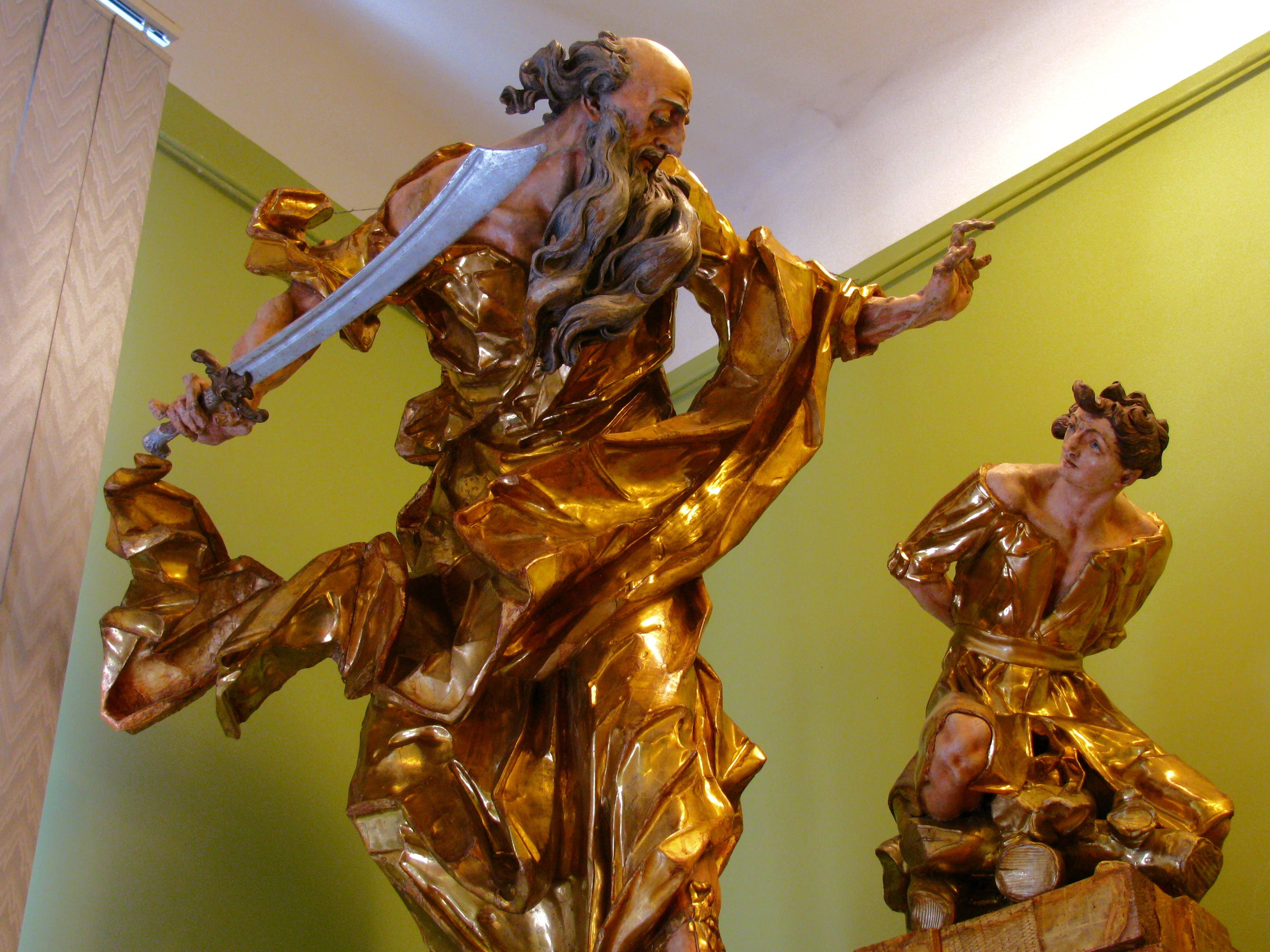 Іван Георгій Пінзель, Жертвопринешення Авраама. Кінець 1750-х років. Липове дерево, поліхромія, позолота. Костел у Годовиці. Виставка "Майстер Пінзель - легенда і реальність" у Львівській національній галереї мистецтв імені Бориса Возницького